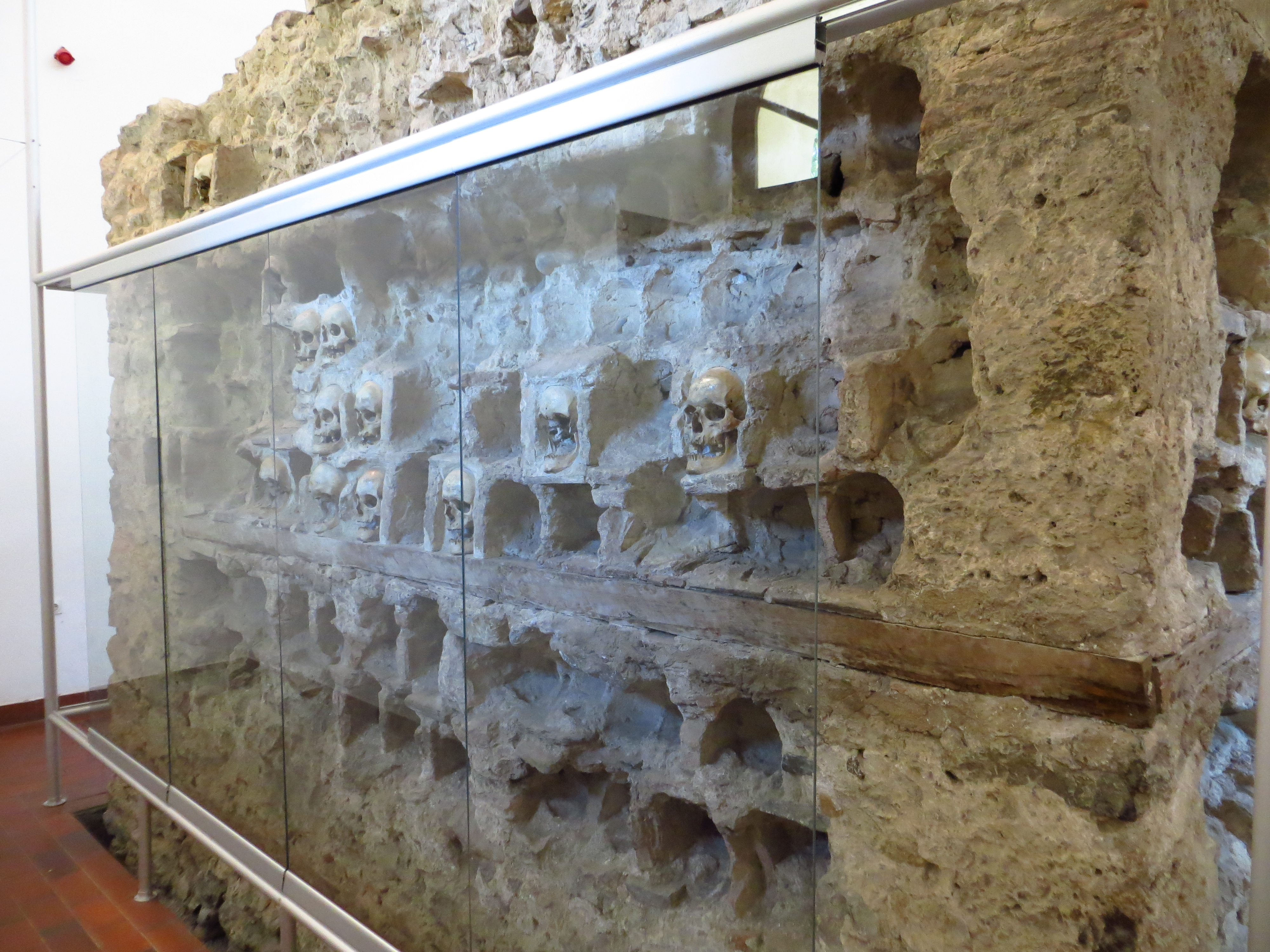 Ćele kula slikana unutra